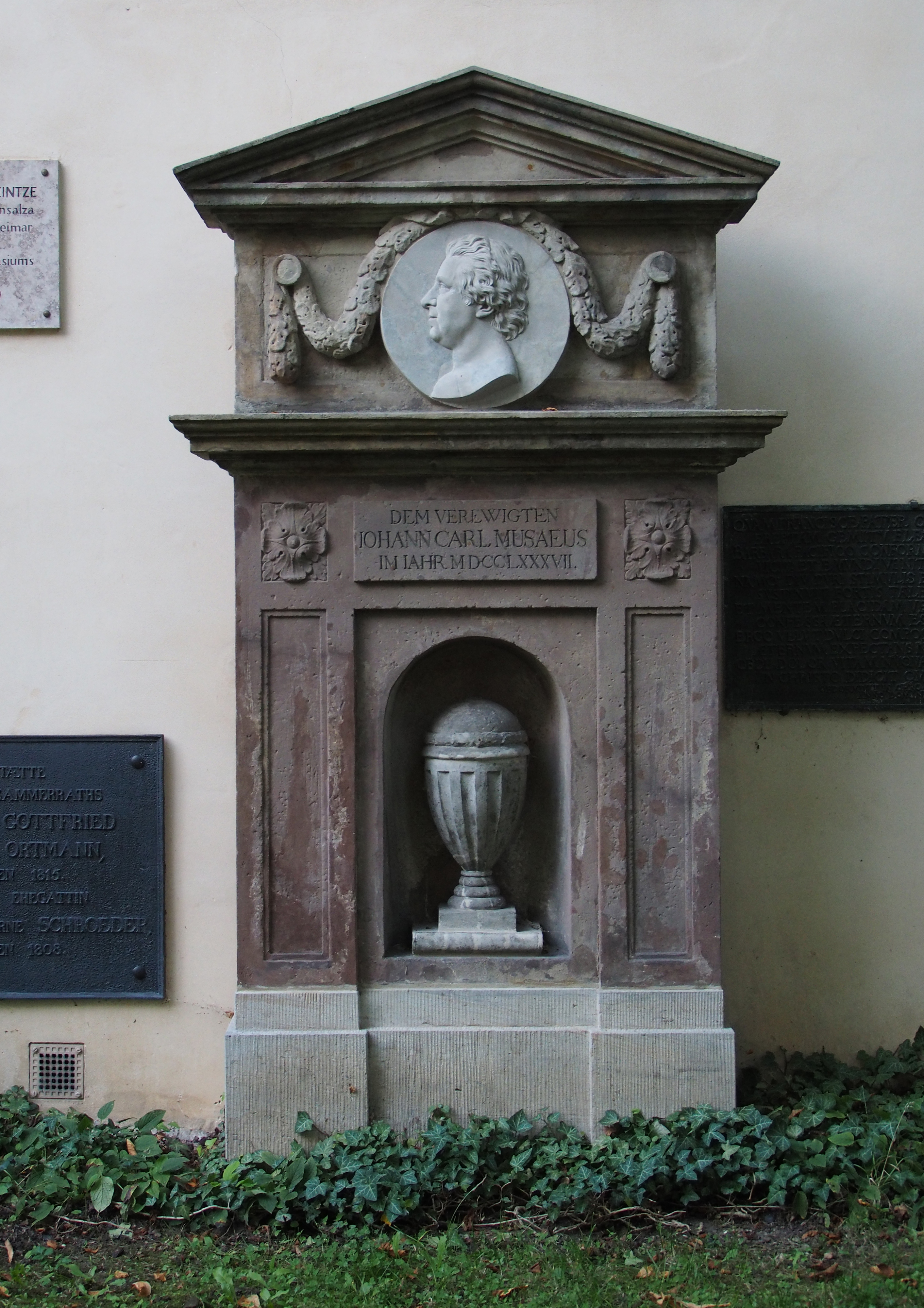 Grabstein von Johann Carl Musaeus Jakobskirchhof in Weimar